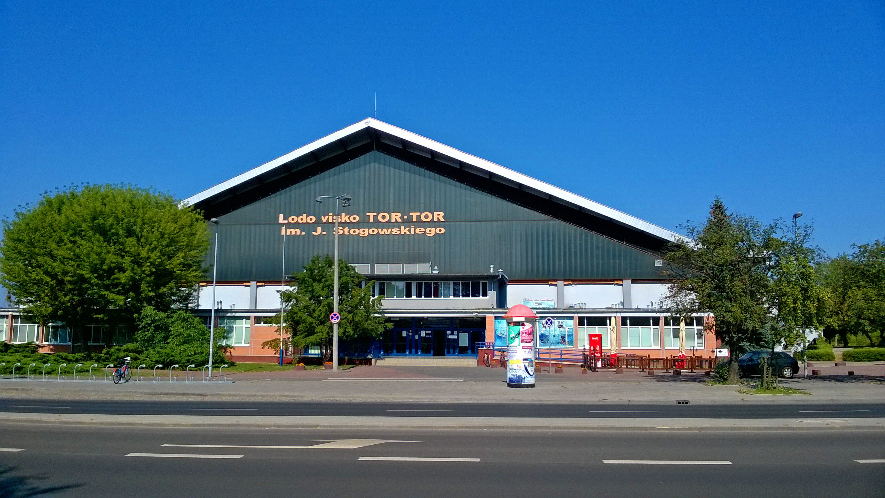 Lodowisko w Toruniu55